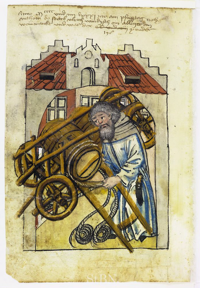 vlrich (Ulrich) windysch (Windisch; Wündisch) , ableger (Ableger; Ablader) Transkription und weitere Informationen